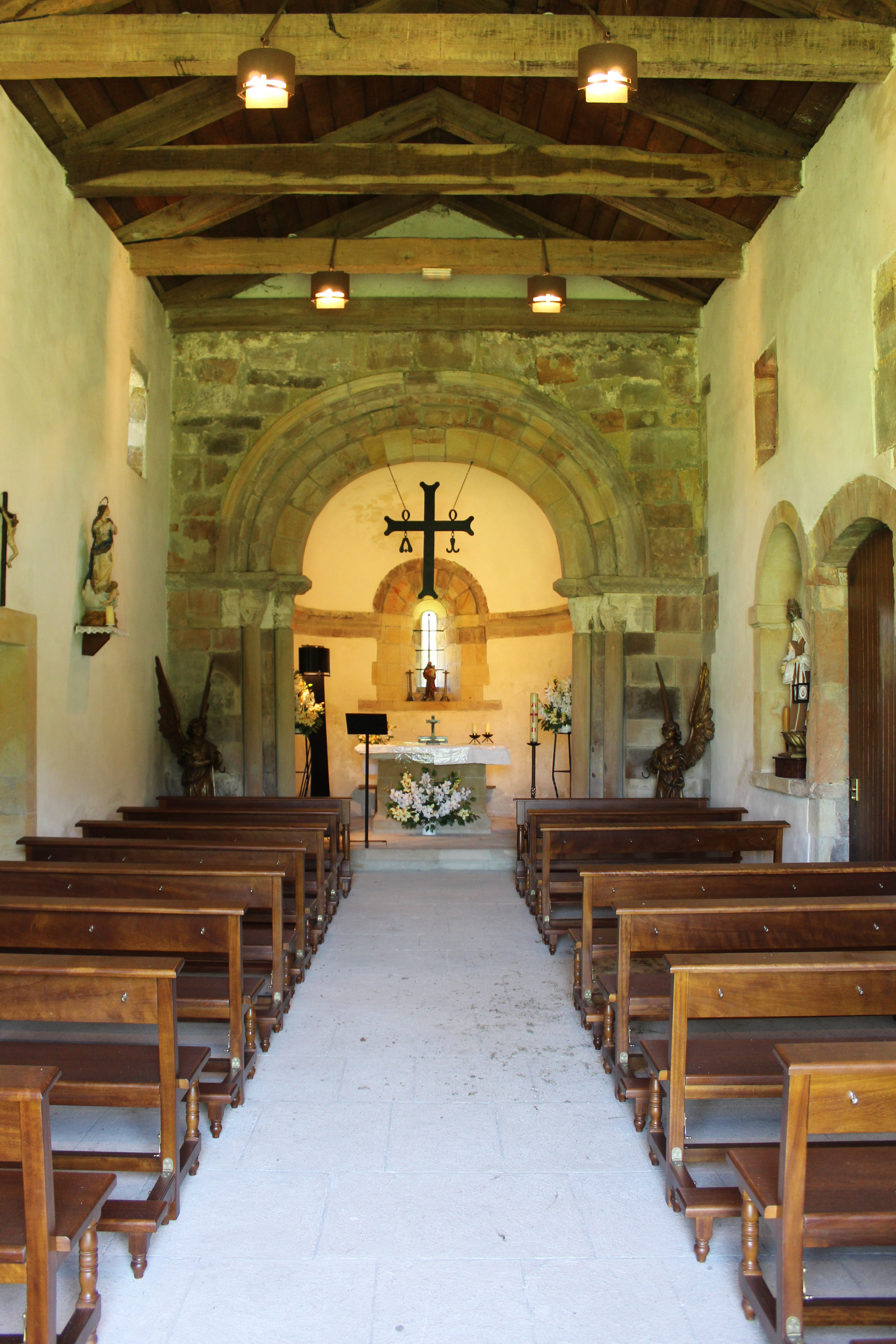 Nave central